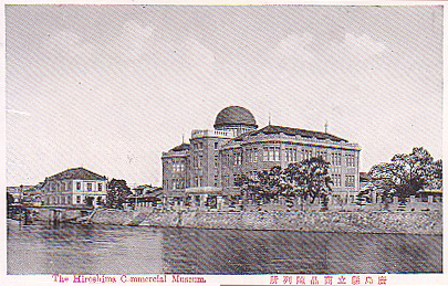 広島県商品陳列館 Hiroshima Commercial Museum